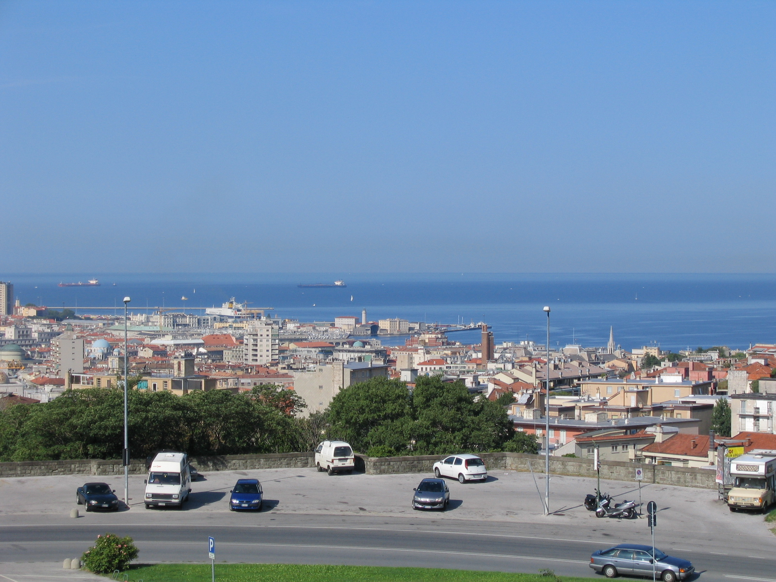 Trieste dal colle dell'Università